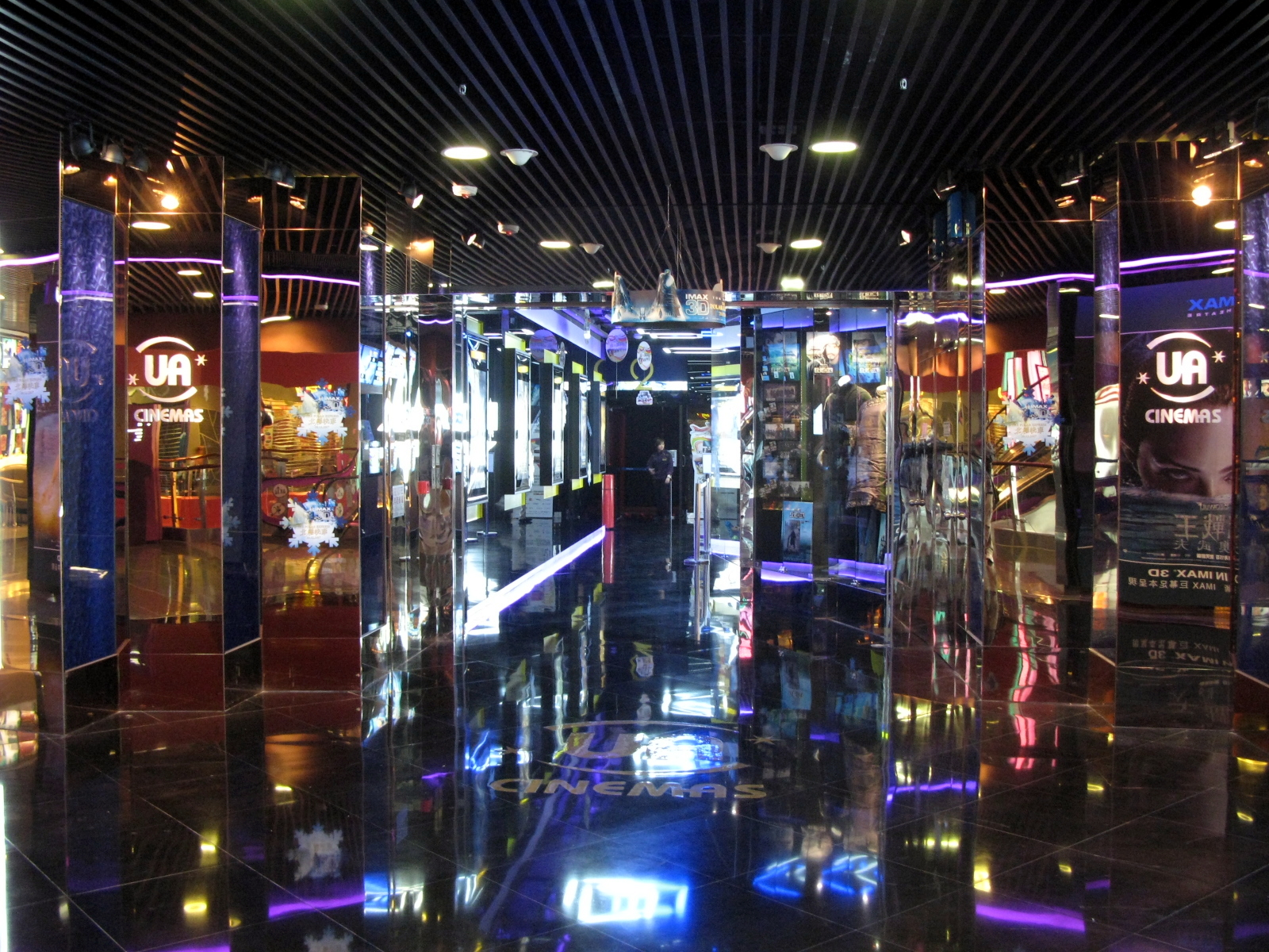 UA Cinema in Megabox,Hobg Kong